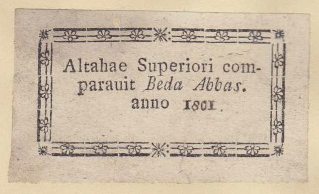 Ex libris, Kloster Oberaltaich, Abt Beda Aschenbrenner